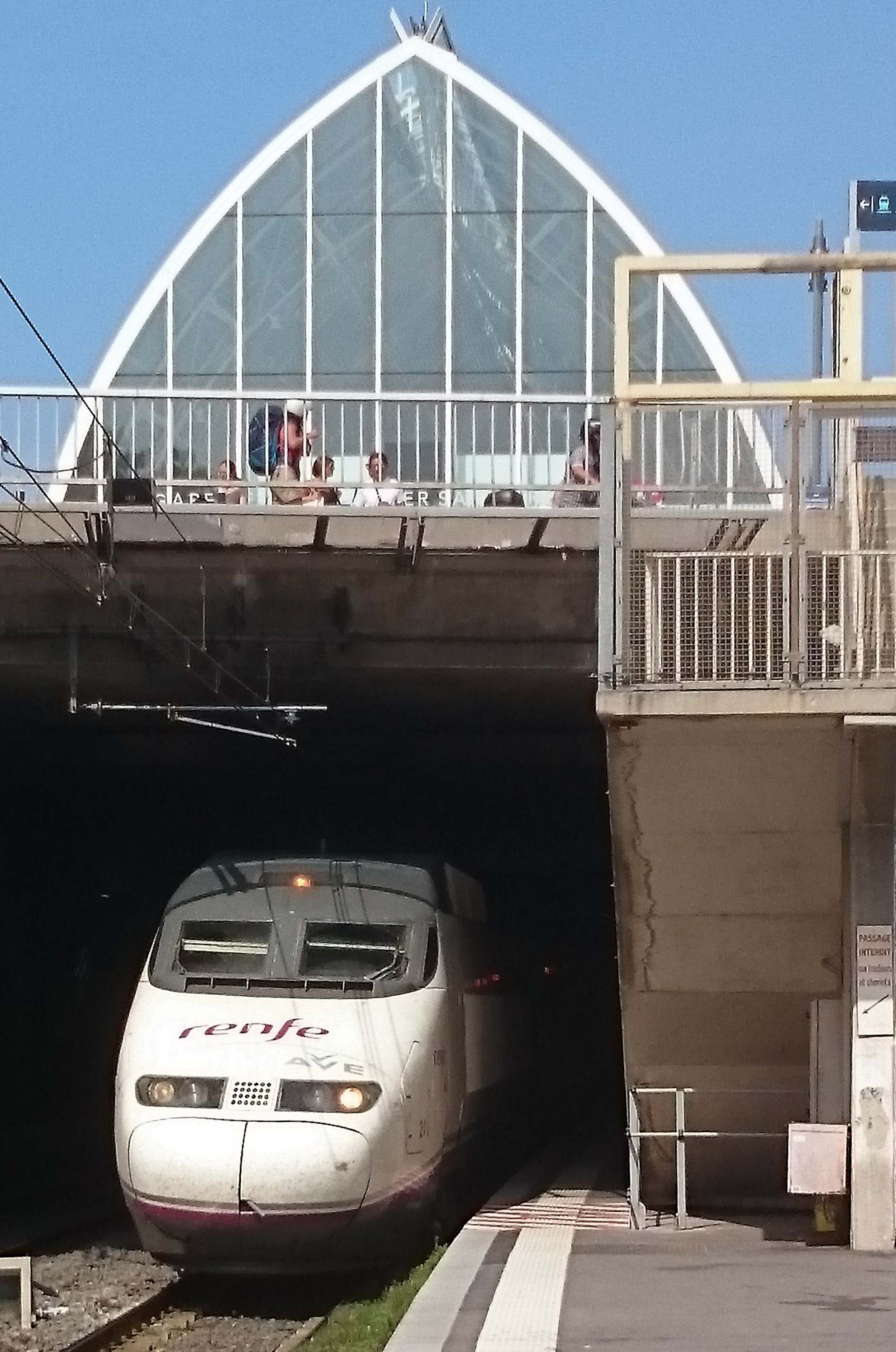 AVE richting Spanje in Montpellier